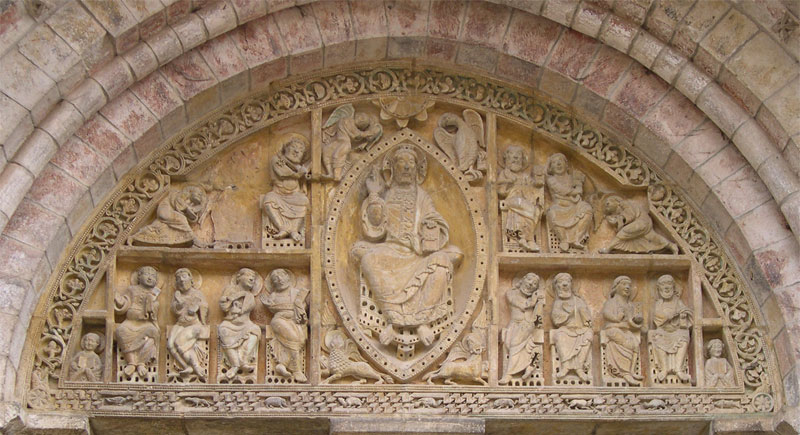 Priorat de Carennac. Timpà. Òlt, França